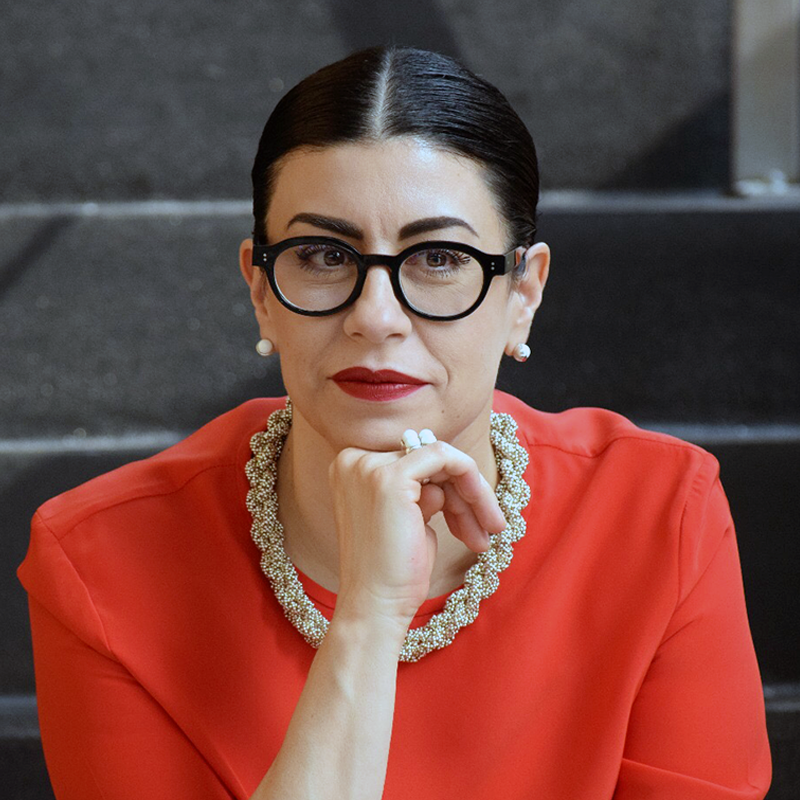 Subsecretaria de Hacienda y Crédito Público en México